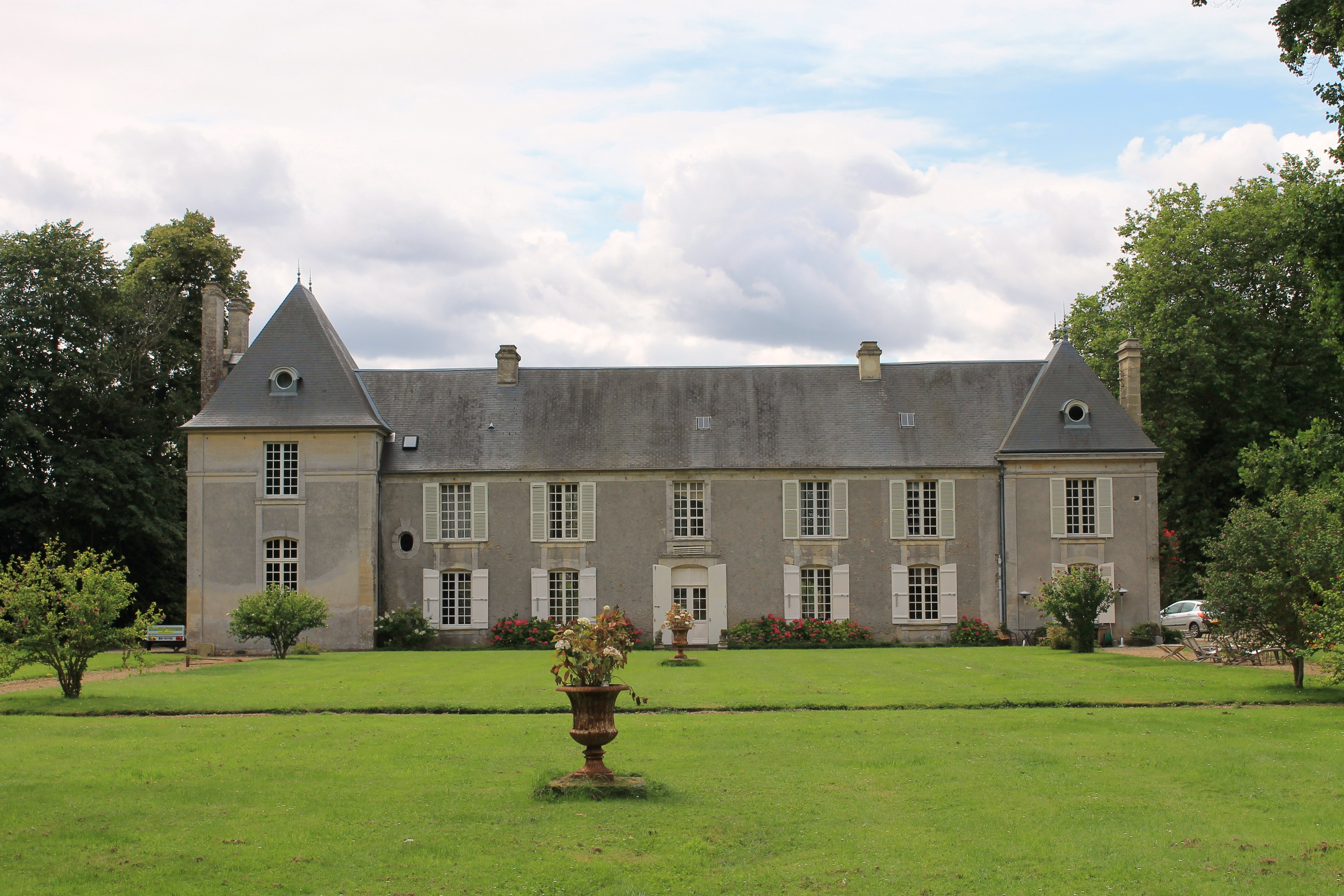 Manoir au 8 et 10 rue de l'église à Colomby-sur-Thaon (Calvados)